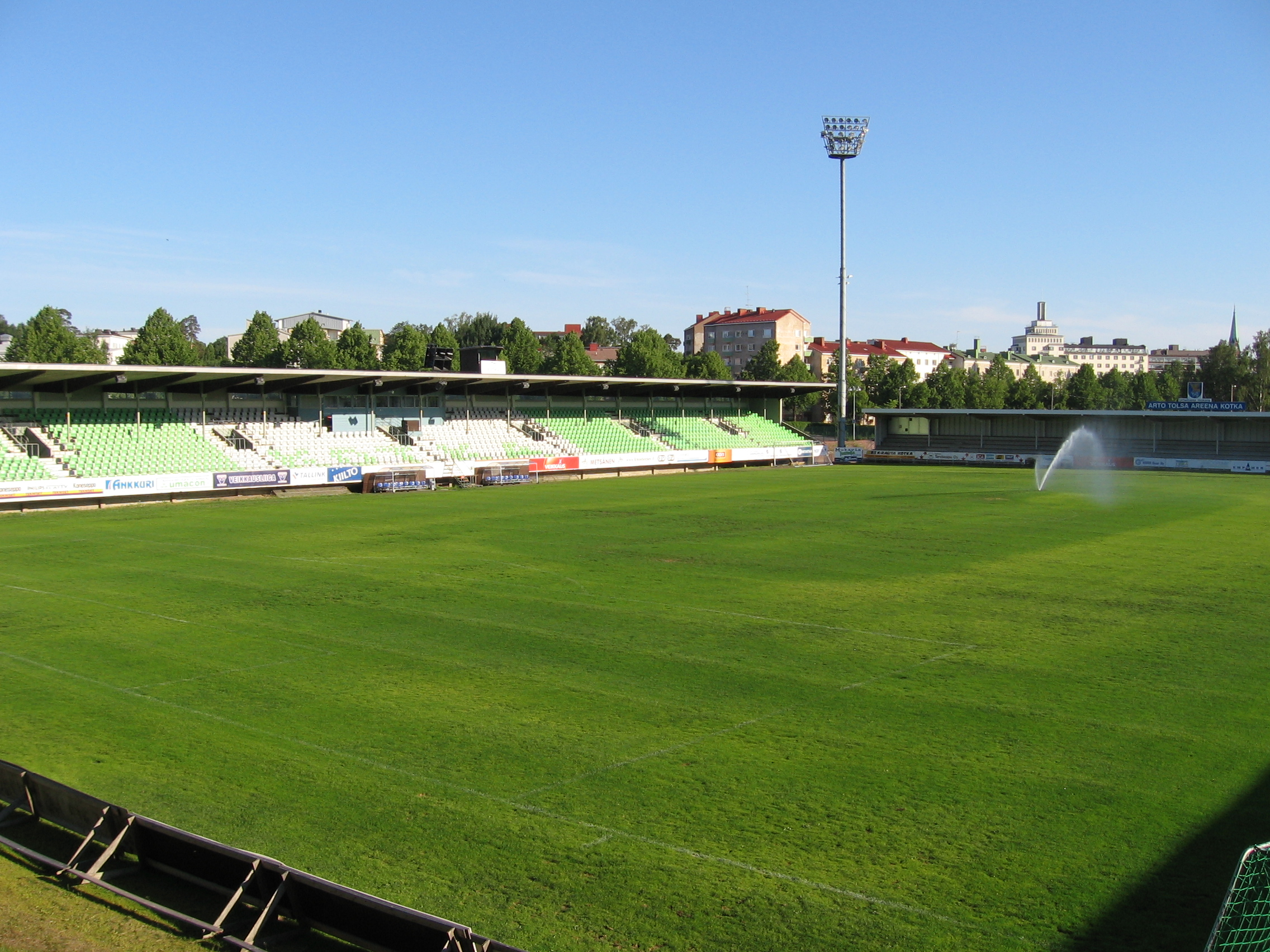 Arto Tolsa -areena, Kotka, Suomi